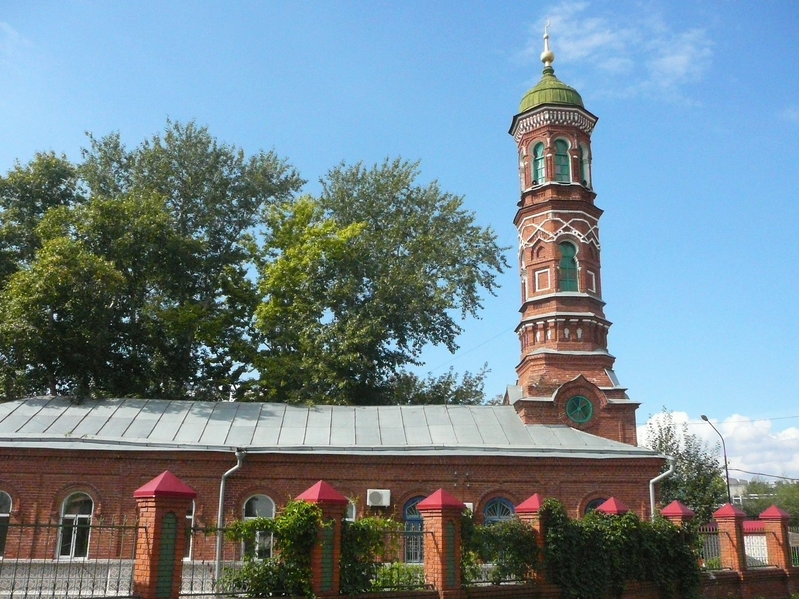 Мечеть Бурнаевская (минаретное завершение мечети Бурнаевской) (Республика Татарстан, Казань, Ахтямова улица, 7)